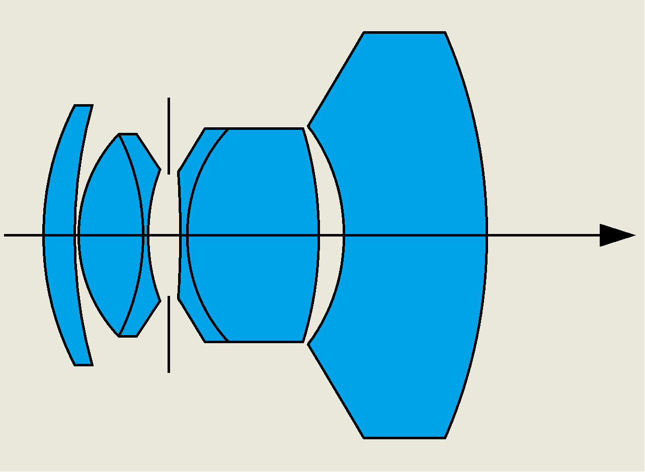 Biogon 1 : 2,8 f = 3,5 cm Carl Zeiss Jena (Ludwig Bertele, 1936) Linsenschnitt